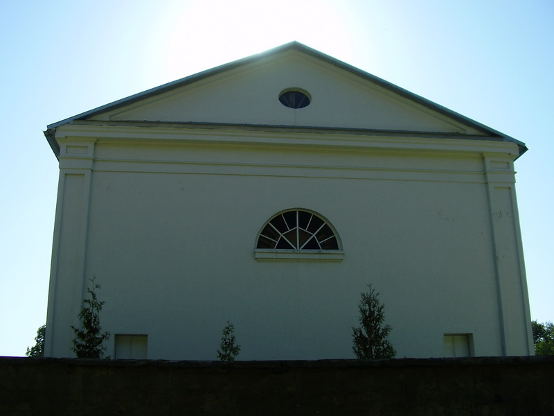 Малая Бераставіца. Касцёл